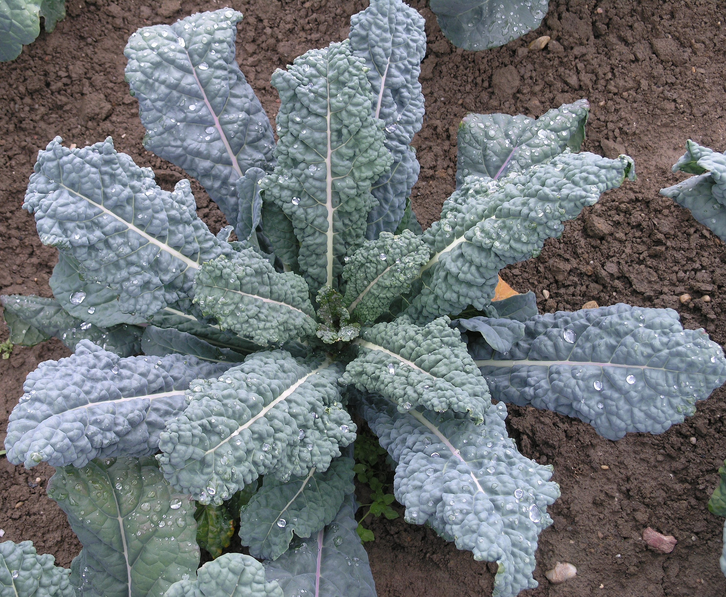 Palmkohl, Italienischer Kohl